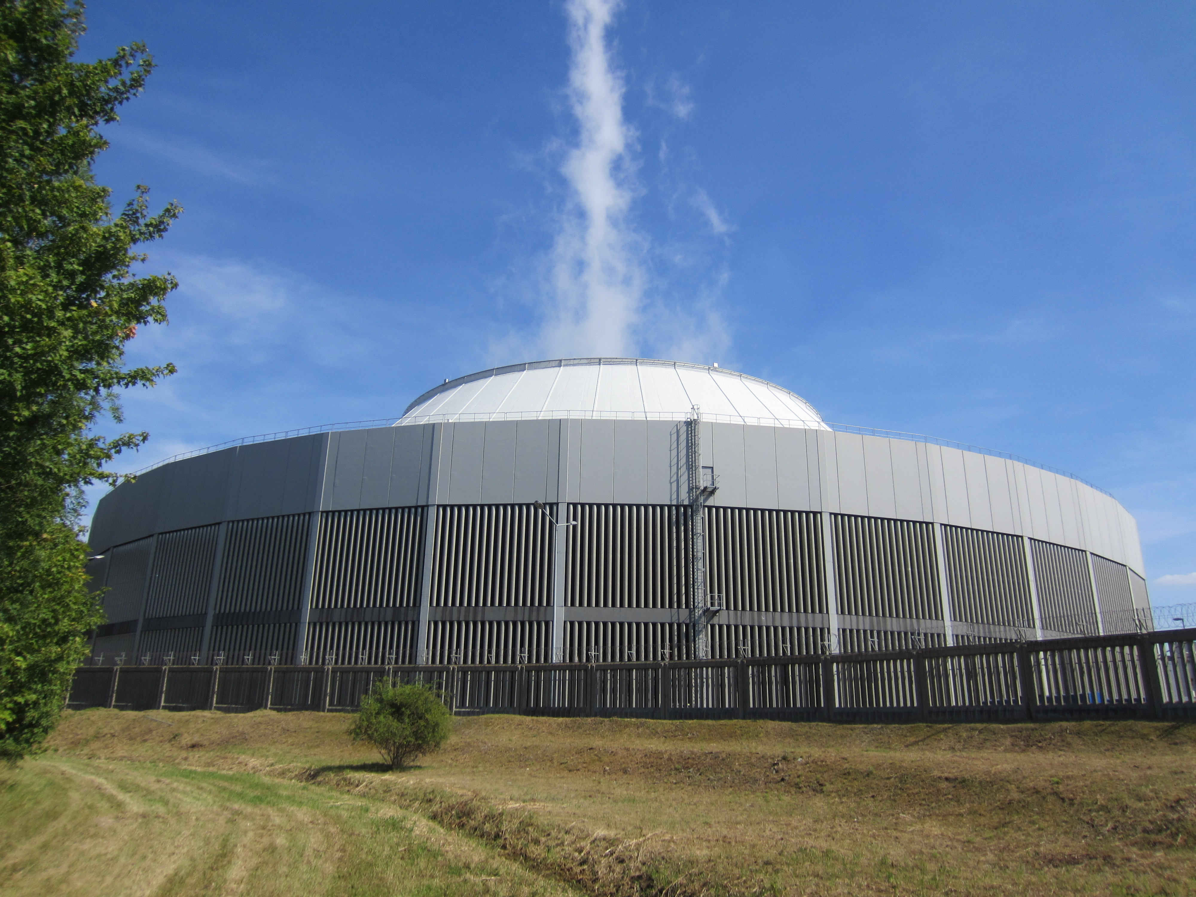 Kernkraftwerk Neckarwestheim